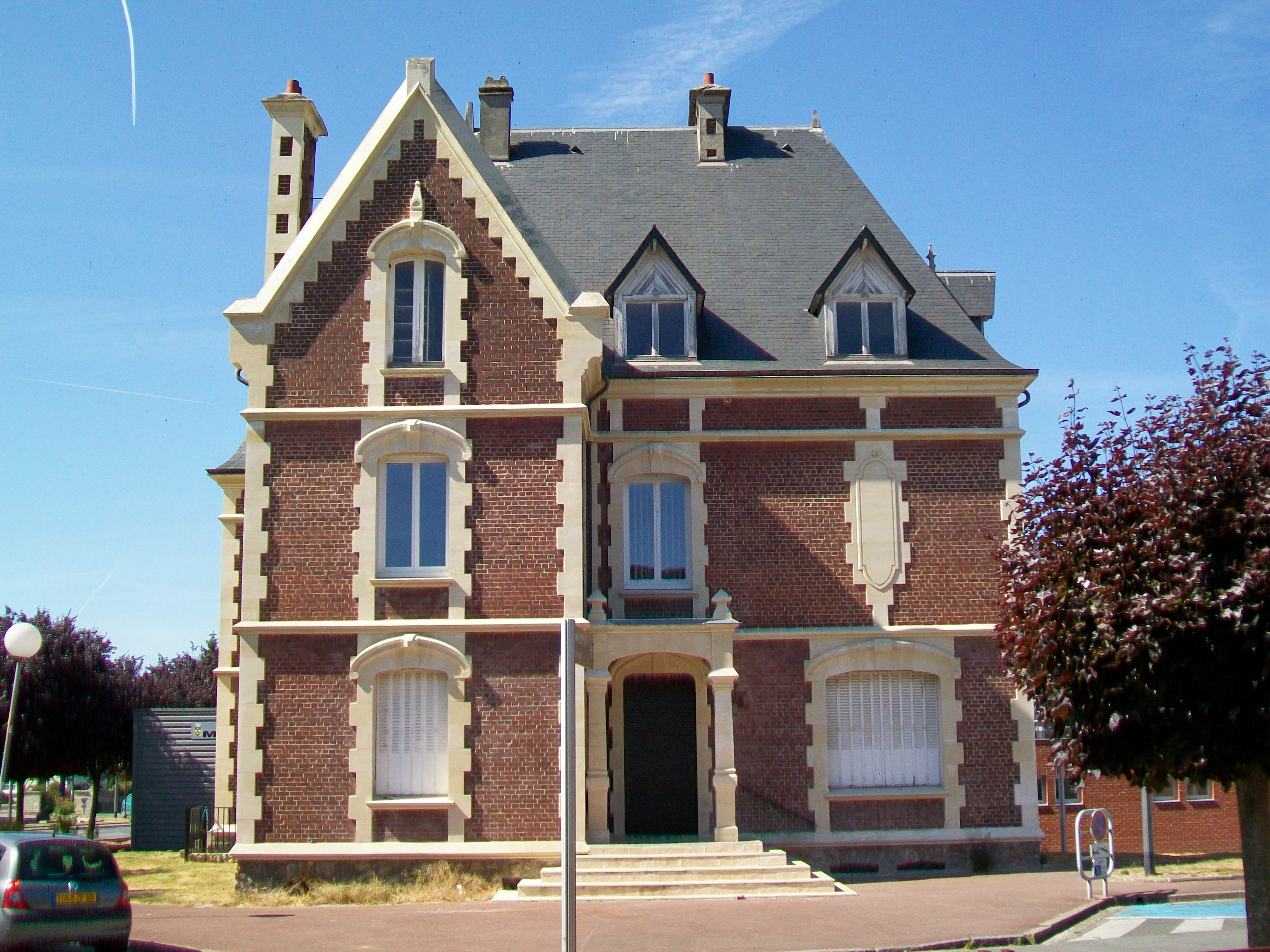 Le centre culturel municipal dans l'ancien château Richard, rue Louis-Boilet.